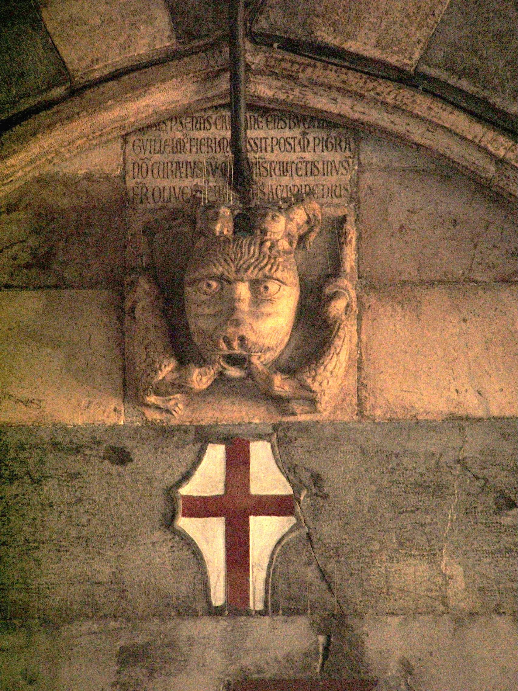 Immagine dalla città di Genova: Palazzo San Giorgio